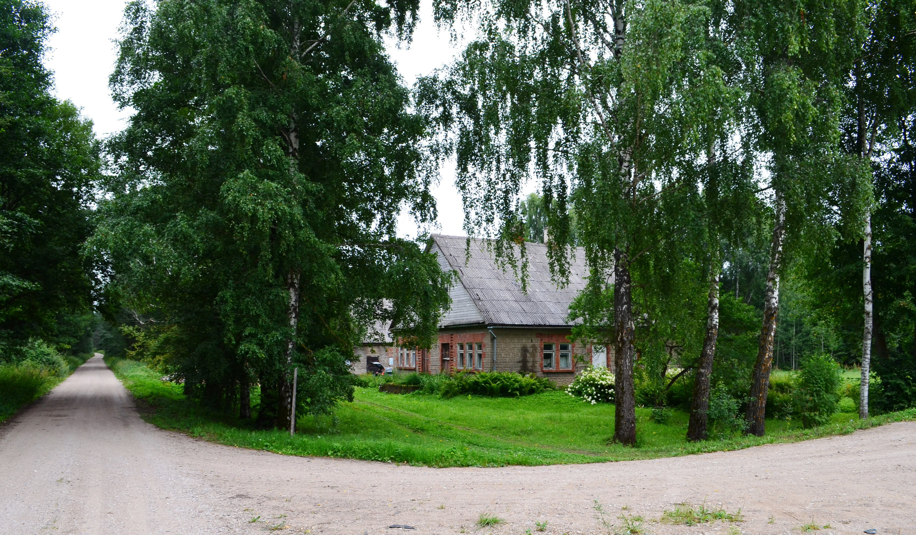 Zalūbiškis, Rokiškio r.